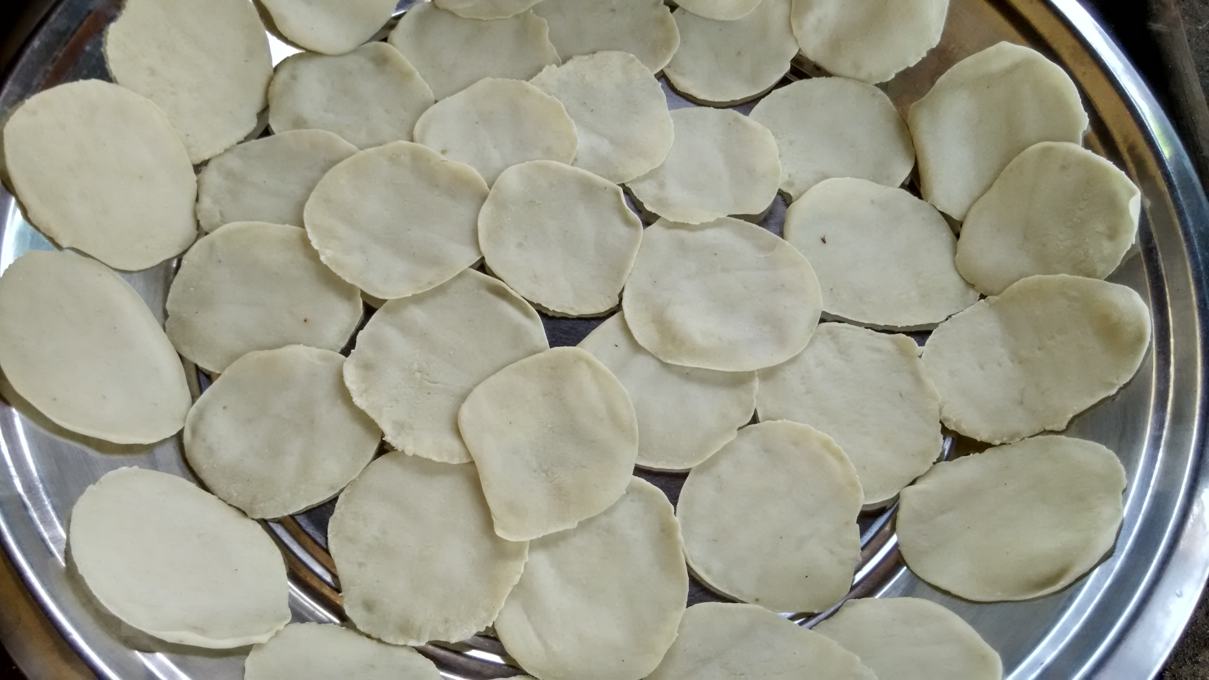 பானி பூரி உருவாக்க நிலை.